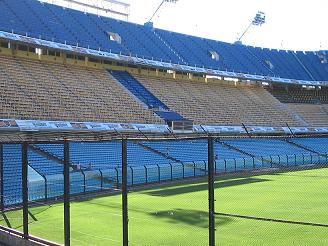 Estadio de boca juniors.